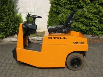 Elektrischer Still-Schlepper R 06-06, Baujahr: 1997, Zugkraft: 6000 kg, Superelastikreifen